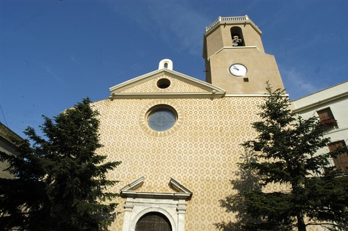 Façana principal de l'església de Sant Pere de Riudecols presa des de la Plaça de l'Església.